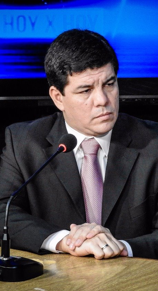 Mario Samaniego, director y propietario de LT4